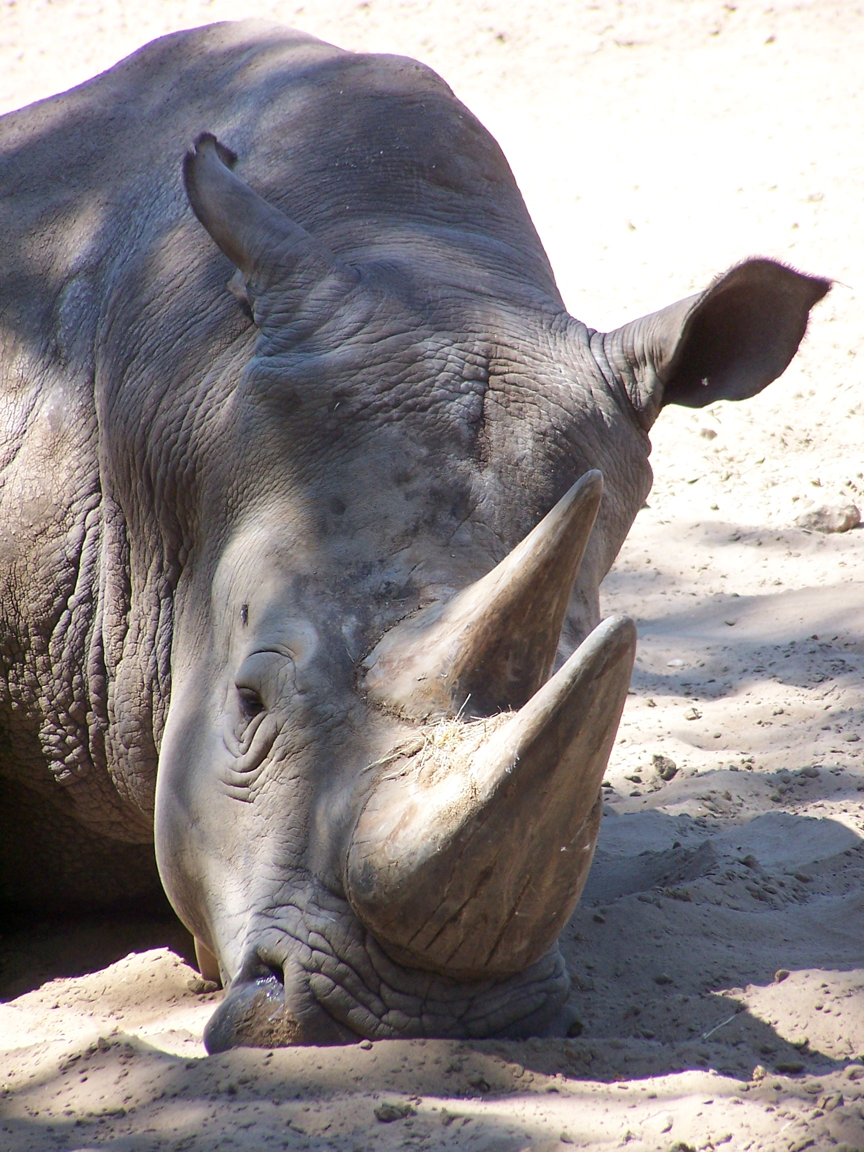 Photographie de Whi, un rhinocéros blanc (Ceratotherium simum) mâle du Zoo de la Palmyre, se reposant à l'ombre. Le rhinocéros blanc est en fait de couleur grise, mais un peu plus claire que celle des rhinocéros noirs (Diceros bicornis). Sa longueur peut aller jusqu'à 4 m (hors queue), sa hauteur au garrot est d'environ 1,80 m et son poids va de 1 400 jusqu'à 3 500 kg, ce qui en fait la plus grande de toutes les espèces de rhinocéros. L'odorat est chez lui le sens le plus important ; les oreilles et yeux jouent au contraire un rôle secondaire. Herbivores, les rhinocéros blancs se rencontrent principalement dans les savanes africaines, où ils sont généralement actifs et crépuscule et dorment dans la journée. Très abondants il y a encore quelques décennies à peine, sont aujourd'hui menacés d'extinction, non seulement en raison de la destruction de leur habitat, mais surtout du braconnage pour leurs cornes, qui bien que n'étant constituées que de simple kératine, comme les ongles et les cheveux, sont très convoitées par la médecine traditionnelle chinoise ou pour la fabrication de manches de poignards au Yémen. La population mondiale est ainsi passée de plus de 2 millions d'individus au début du XIXème siècle, à 18 000 environ aujourd'hui, toutes espèces confondues. Le rhinocéros blanc, qui a ainsi failli disparaître il y a moins d'un siècle (il en restait moins de 50 individus), est désormais le seul à être encore présent en nombre raisonnable avec 14 540 individus. L'une de ses sous-espèce n'est cependant plus représentée que par 4 individus vivant dans leur dernier refuge, le Parc national de la Garamba, en République démocratique du Congo.